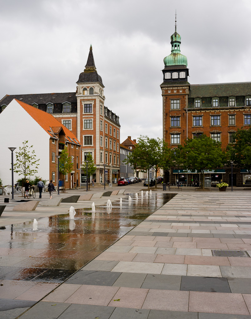 Axeltorv, Fredericia